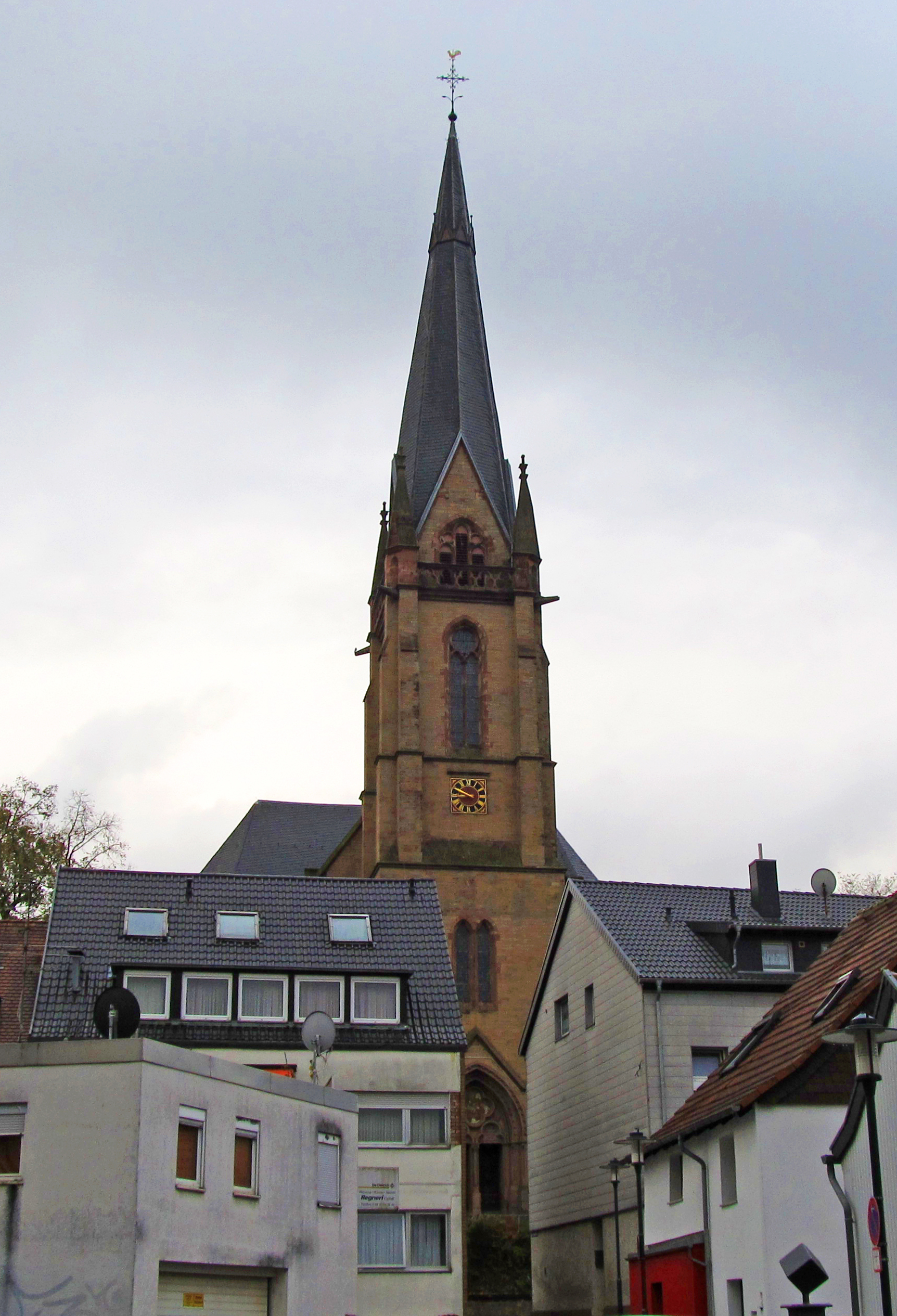 Evangelische Christuskirche, Dudweiler, Stadt Saarbrücken, Saarland